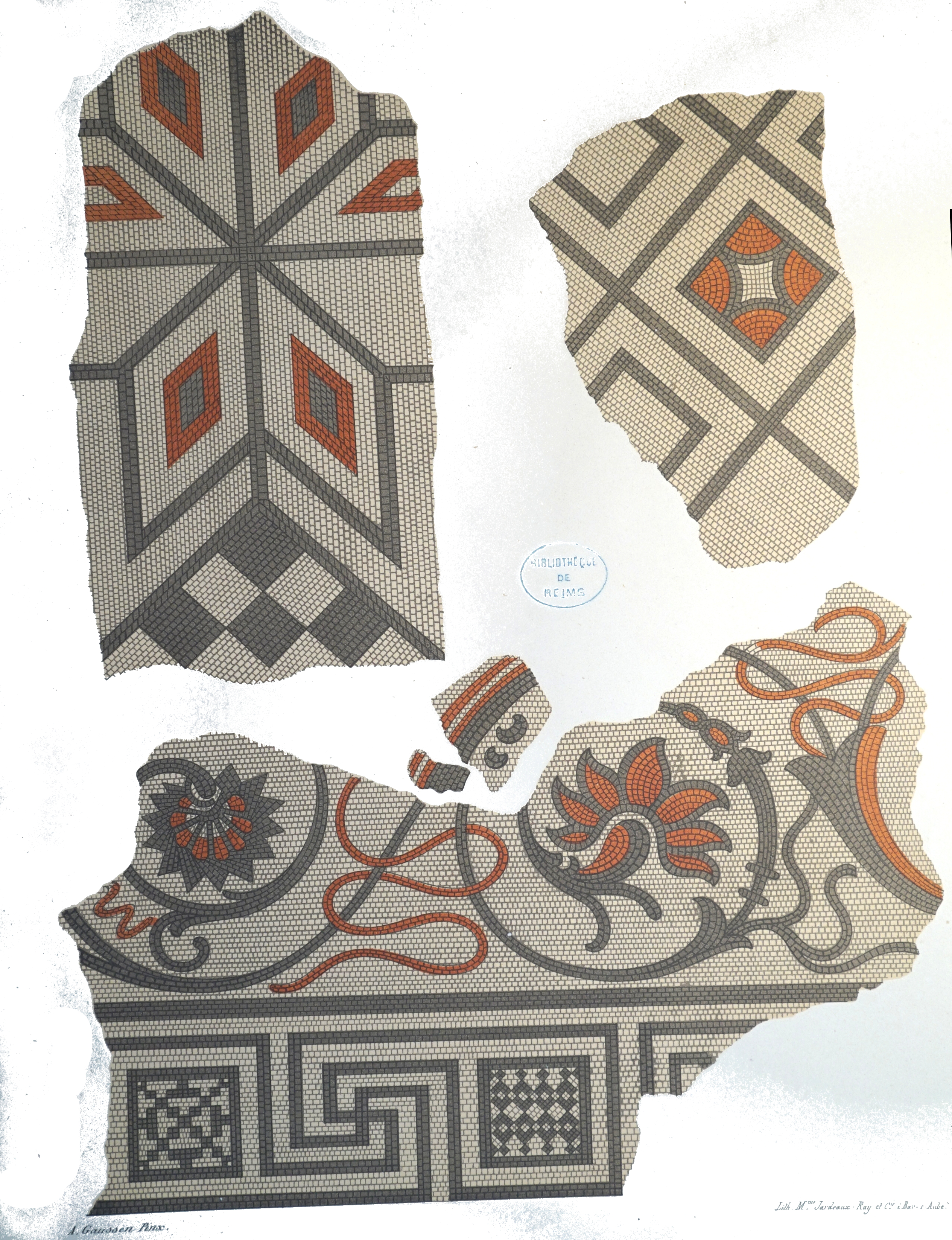 dessin in Portefeuille archéologique de la Champagne